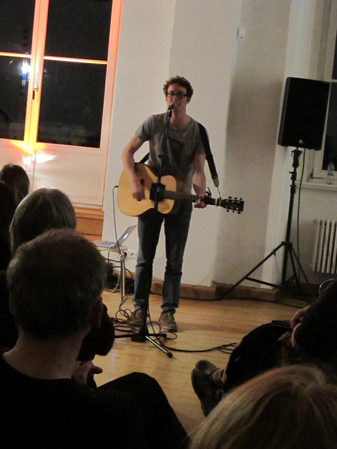 Leipziger Buchmesse 2014, Spaceman Spiff